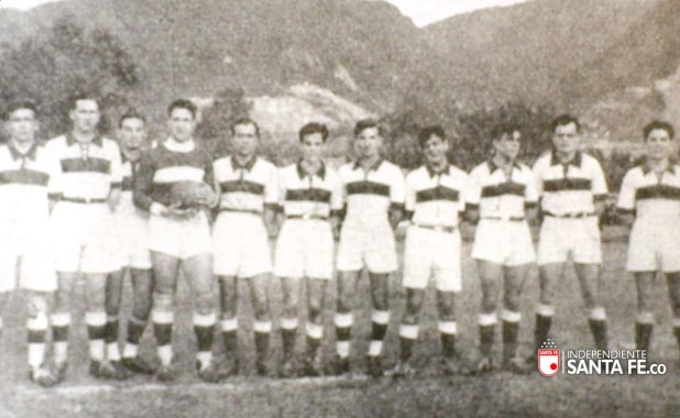 Independiente Santa Fe, primer equipo, primer uniforme.